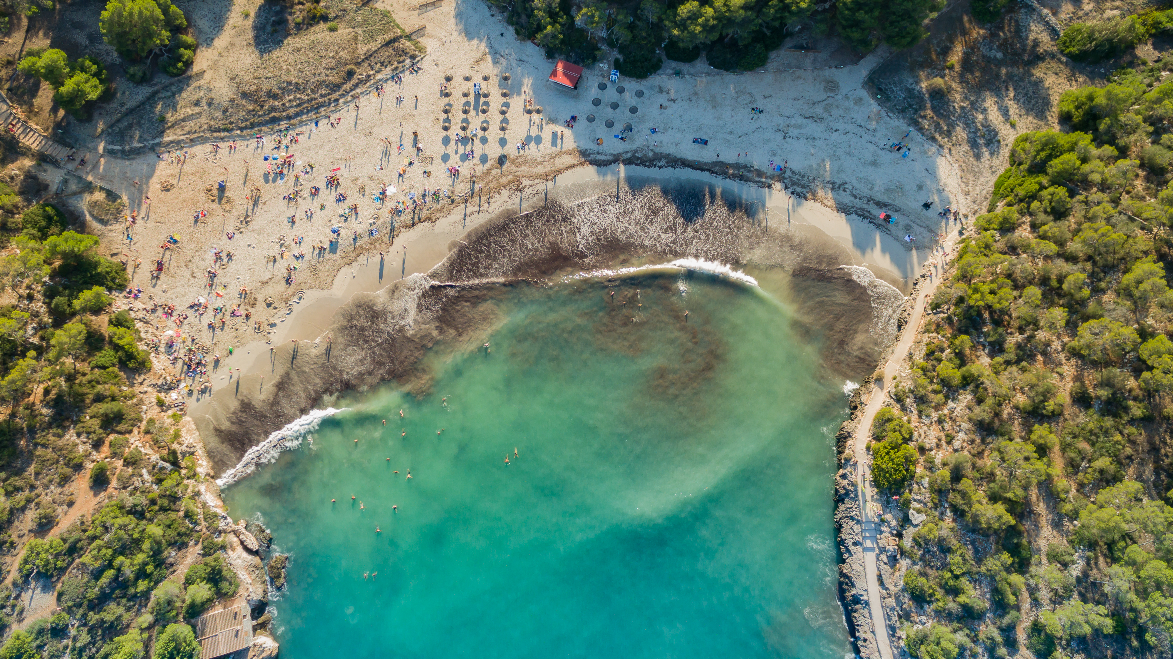 Mallorca schönste Strände Amarador Luftbild